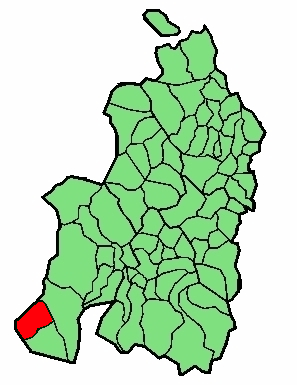 aipaturiko udalerriaren kokapena Nafarroa Beherean